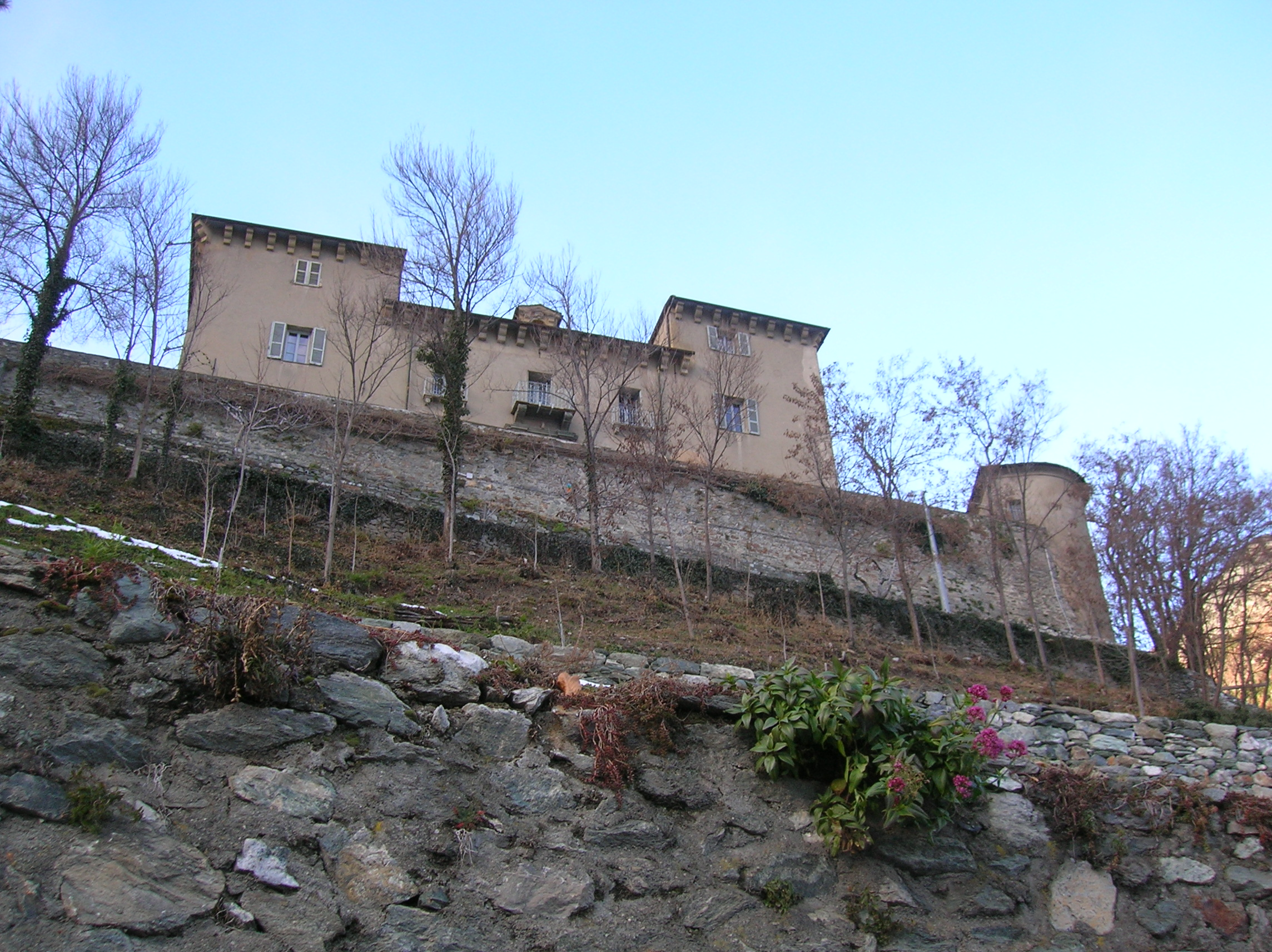 Castello Passerin d'Entrèves visto dalla salita che parte dal borgo. Châtillon, Valle d'Aosta, Italia.